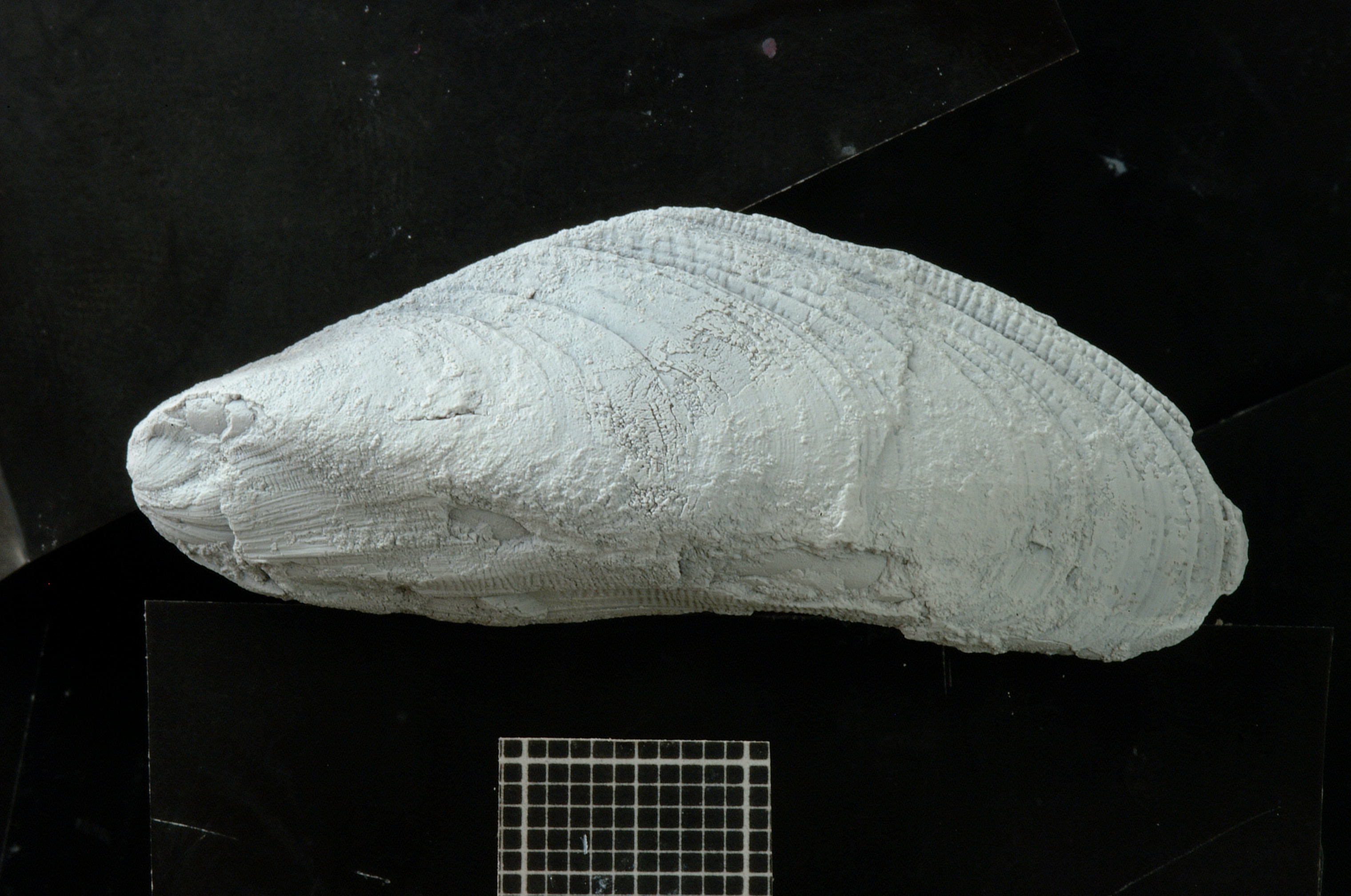 Ejemplar articulado del bivalvo fósil del Cretácico inferior de la Formación Agrio Modiolus ligeriensis. Vista izquierda.